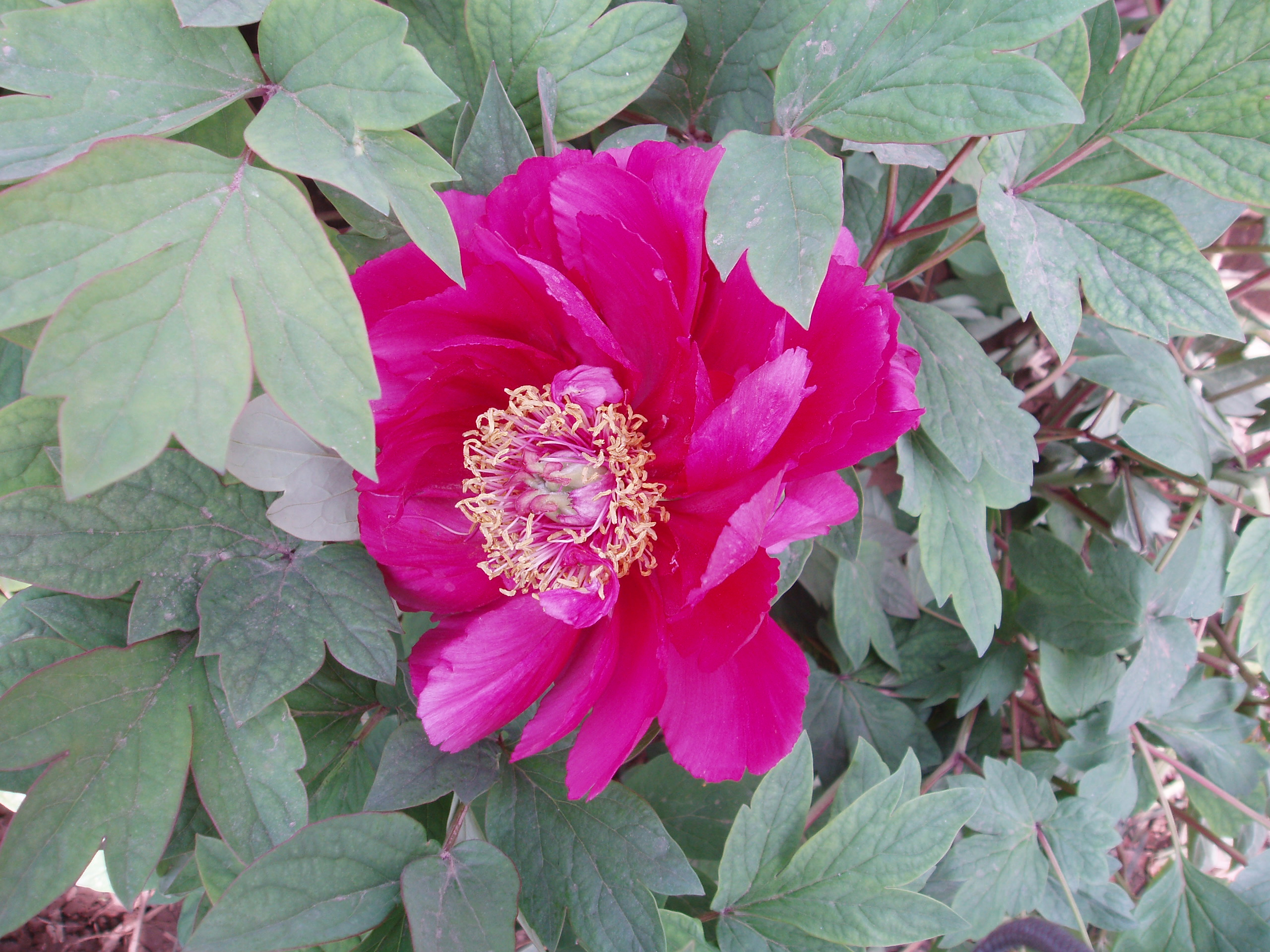 Peony